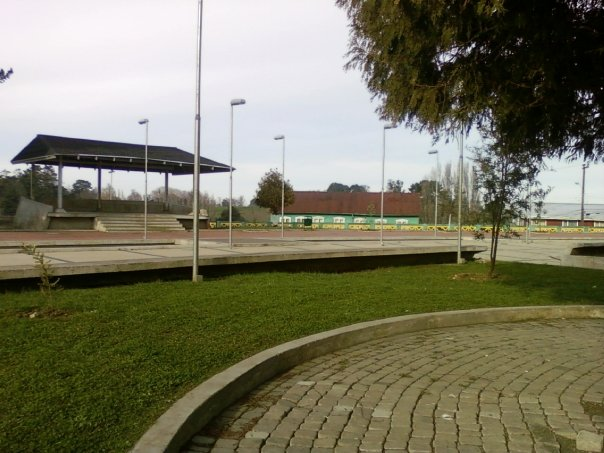 Fotografia de la plaza de armas de la comuna de rio negro, la tome en febrero del 2010.